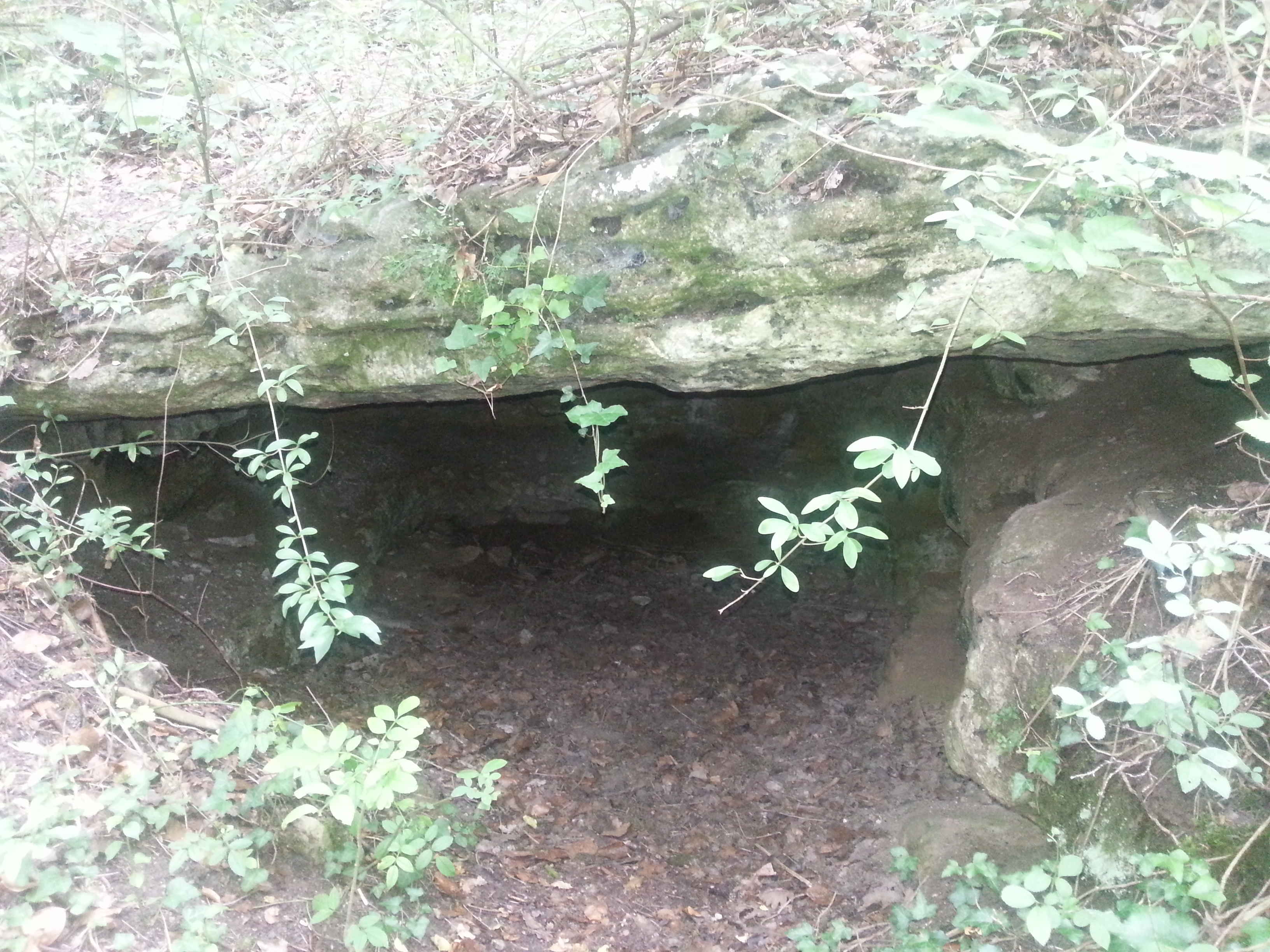 Trou à morts (Classé) .